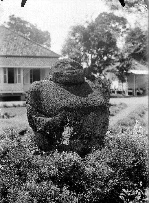 Negatif. Arca megalit asal Tanjungara(u) menghias taman rumah dinas kontrolir di Pagaralam